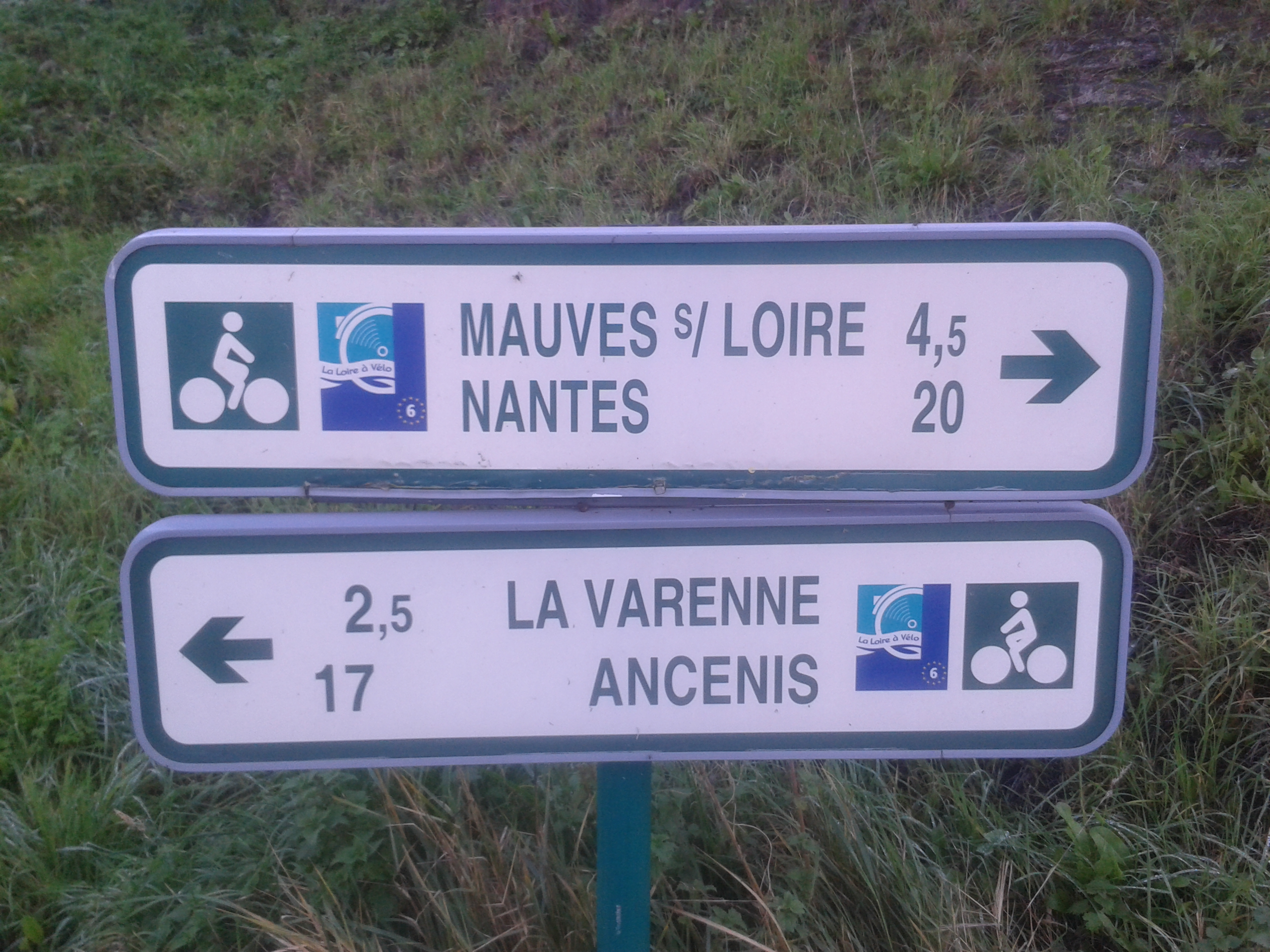 Panneau le long de la Loire (Loire à vélo) indiquant la direction vers Mauves-sur-Loire (4,5 km) et Nantes (20 km) et de l'autre côté, La Varenne (2,5 km) et Ancenis (17 km)